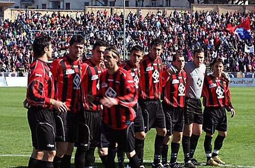 Associazione Giovanile Nocerina 1910, formazione 2007-2008